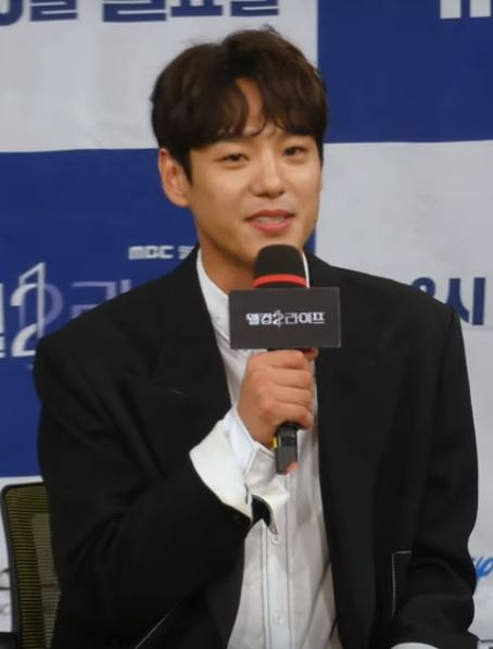 5일 오후 서울시 마포구 상암동 MBC에서 MBC 새 월화드라마 '웰컴2라이프' 제작발표회가 열렸다.